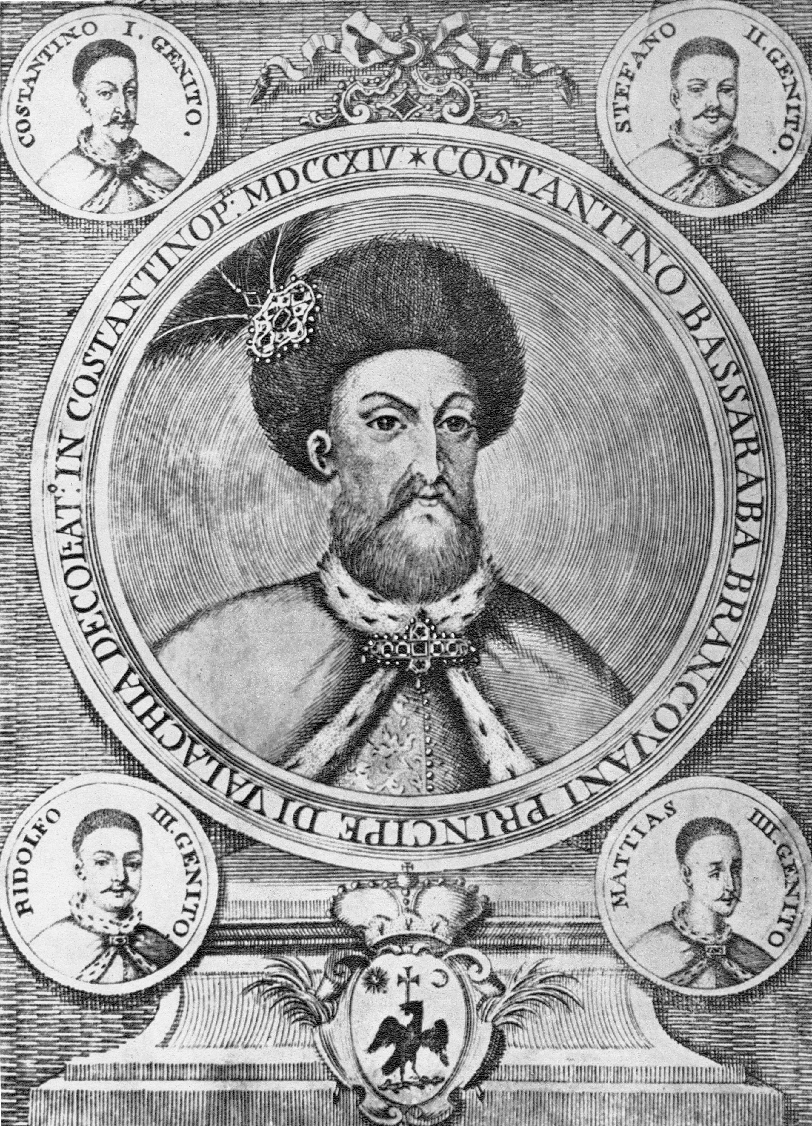 Constantin Brâncoveanul